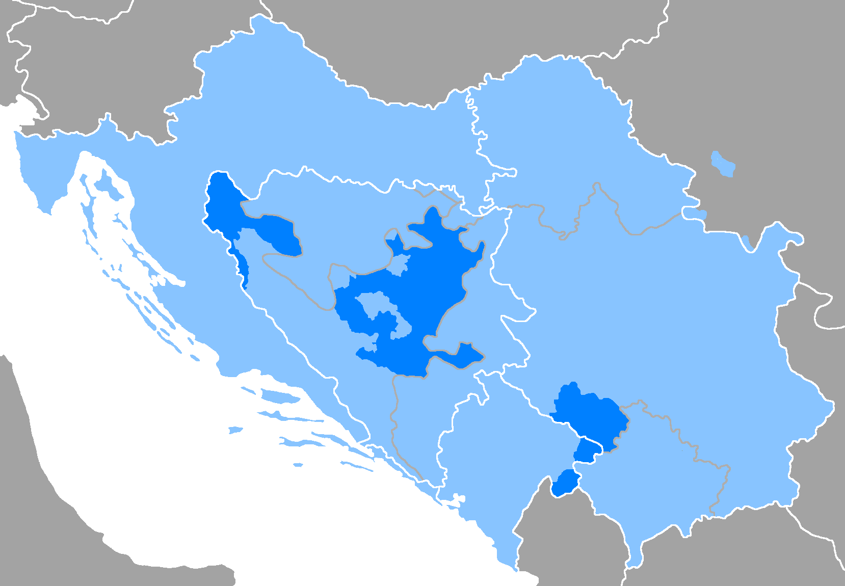 Idioma bosnio Donde es hablado Resto de hablas serbocroatas